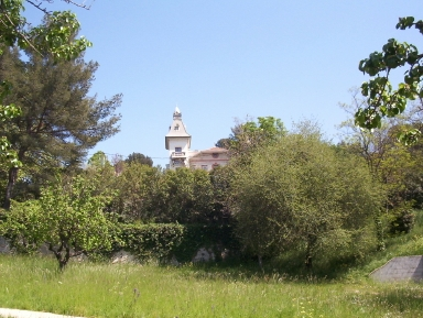 Château Magenta à Marseille